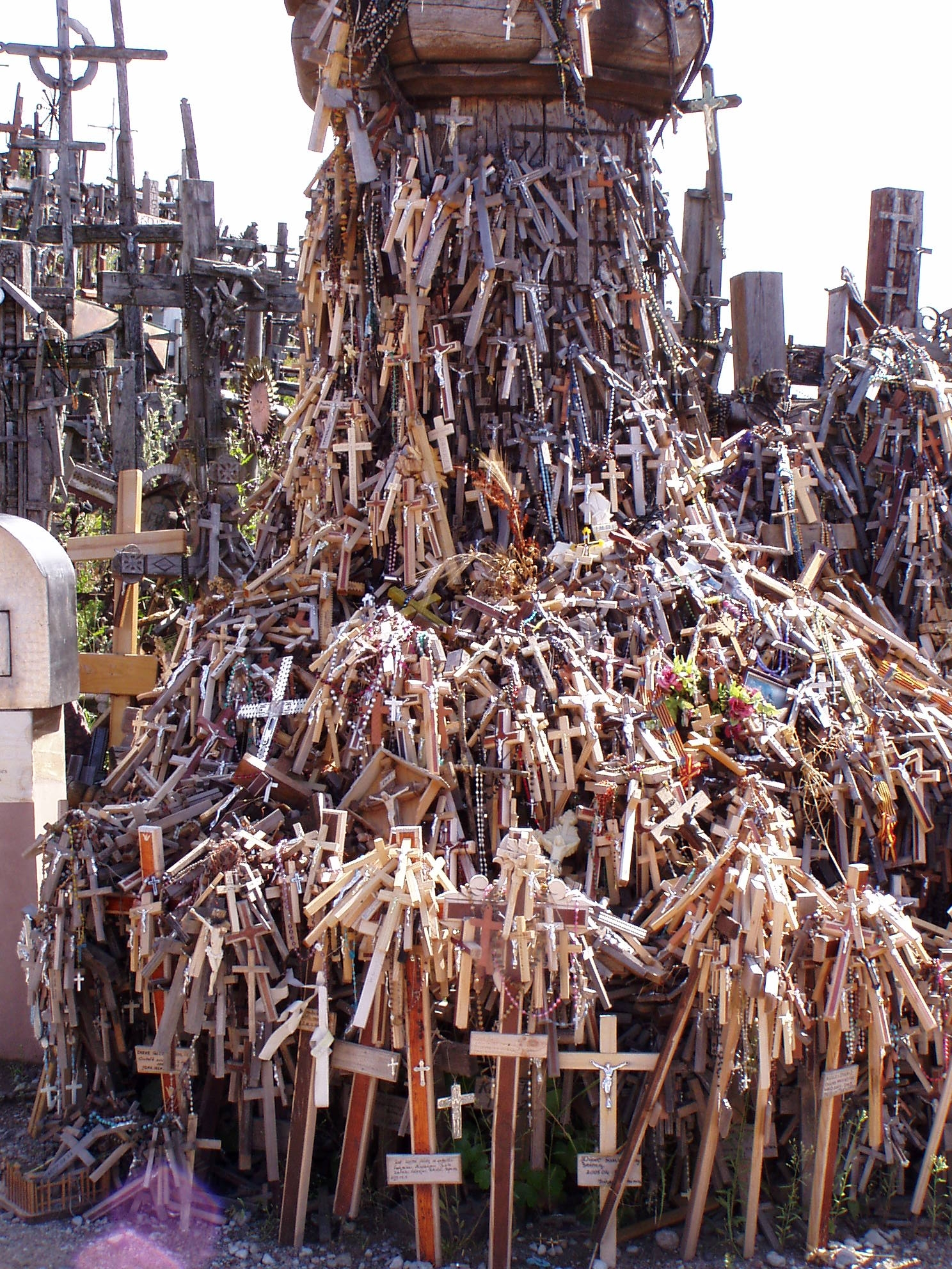 Szawle, Góra Krzyży